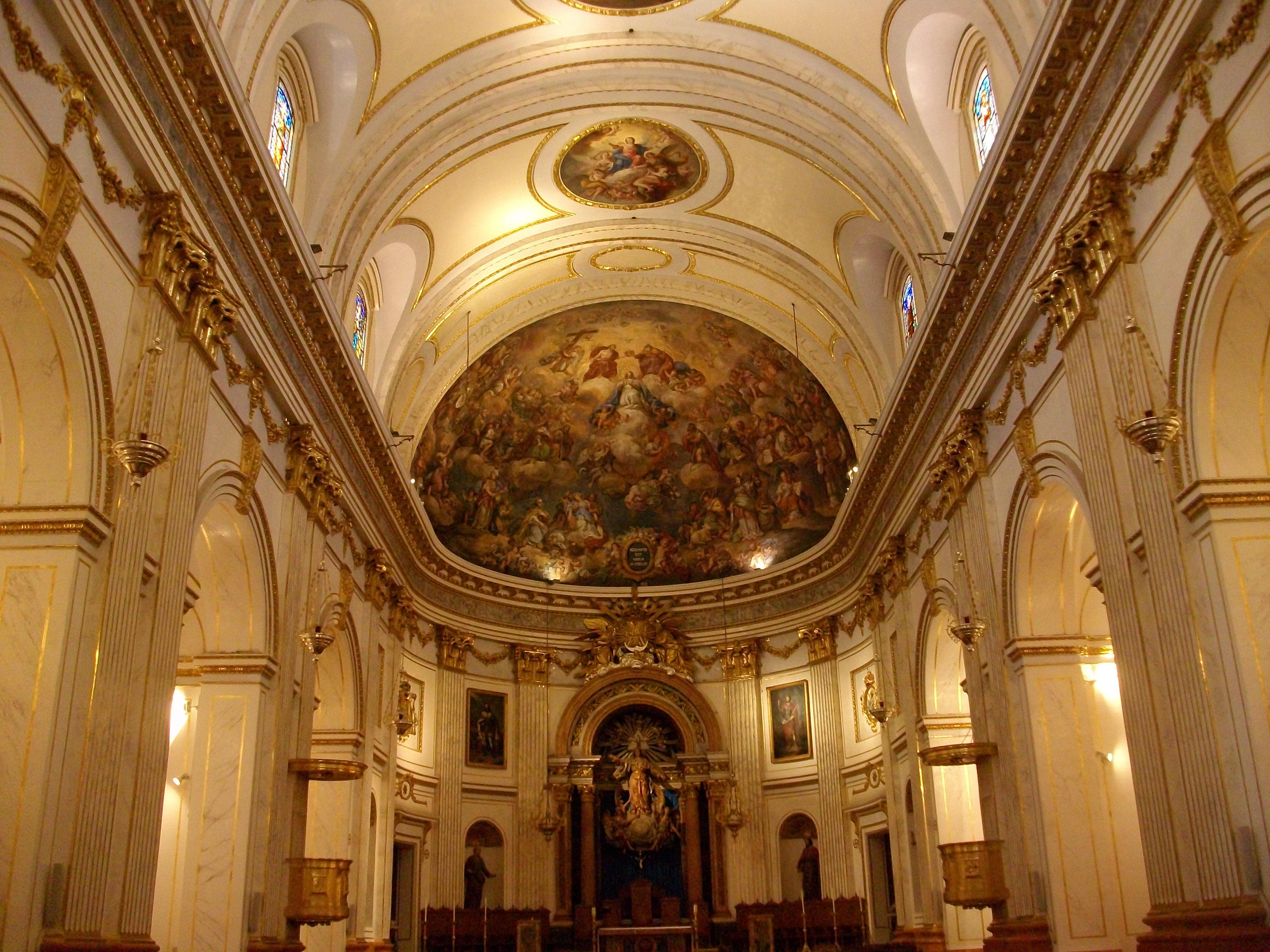 Vista de l'interior de la catedral de Sogorb.